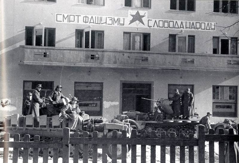 Srpskohrvatski / српскохрватски: Operacija "Kugličasta munja". Nemački brdski lovci, pripadnici III bataljona 98. puka 1. brdske divizije, poziraju za fotografiju na svojim poluguseničarima (Sd.Kfz. 10/4) ispred ogromne partizanske parole "Smrt fašizmu – sloboda narodu", napisane ćirilicom na fasadi Hotela "Čajniče" (u kojem je prethodno bio smešten partizanski štab). Na sredini fasade još uvek se vidi nemačko "V" (Viktorija, pobeda), preko kojeg su partizani nacrtali svoju petokraku. U gradu Čajniču proteklih je nedelju dana boravila partizanska II dalmatinska brigada (II proleterske divizije), koja se ovog puta, suočena sa vidno nadmoćnijim neprijateljem, povukla bez borbe.[1] Srpskohrvatski / српскохрватски: Operation "Ball Lightning". German mountain troopers, members of the III Battalion, 98th Regiment, 1st Mountain Division, pose for a photograph in their half-tracks (Sd.Kfz. 10/4) in front of a huge Partisan slogan "Death to fascism – freedom to the people", written on the facade of Hotel "Čajniče" (which previously housed the Partisan headquarters). Still visible in the middle of the facade is a German "V" (Victoria, victory), which was overpainted by the Partisans with their five-pointed star. Staying in the town of Čajniče for the past week was the Partisan II Dalmatian Brigade (of the II Proletarian Division), which, faced with a clearly superior enemy, withdrew without a fight this time.